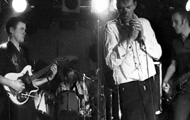 Bild von Konzertaufnahme der englischen Band And Also The Trees im Dortmunder Club FZW im Jahr 1998. Zu sehen sind der Gitarrist Justin Jones, der Schlagzeuger Paul Hill, der Sänger Simon Huw Jones und der Bassist Steven Burrows.